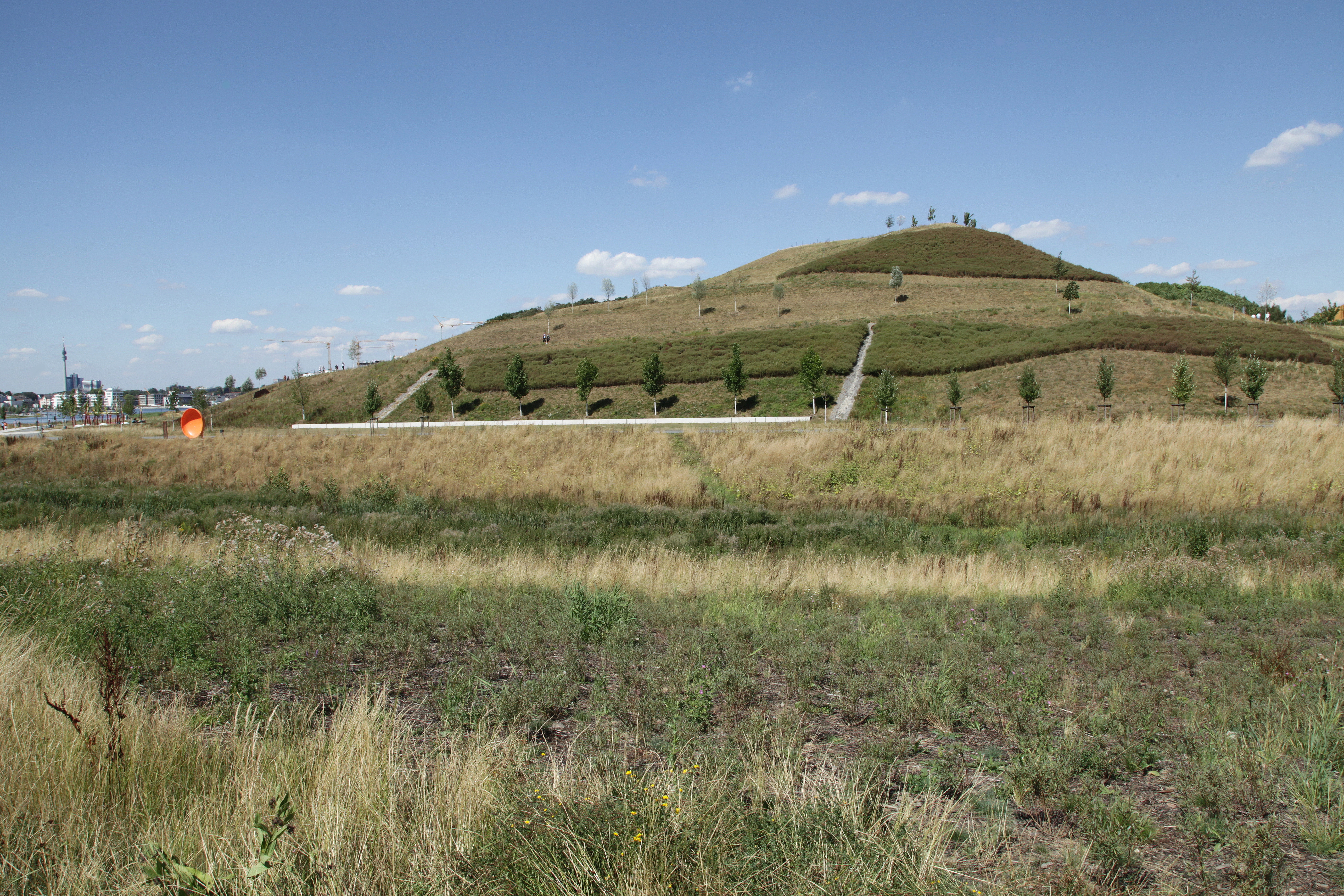 Kaiserberg im See-Park (Phoenix-Ost) in Dortmund